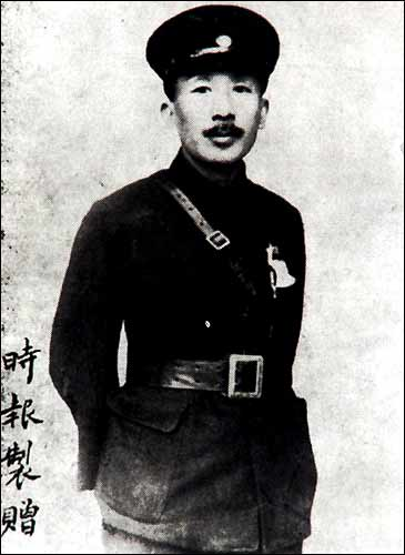 Cai Gongshi, taken before 1921.